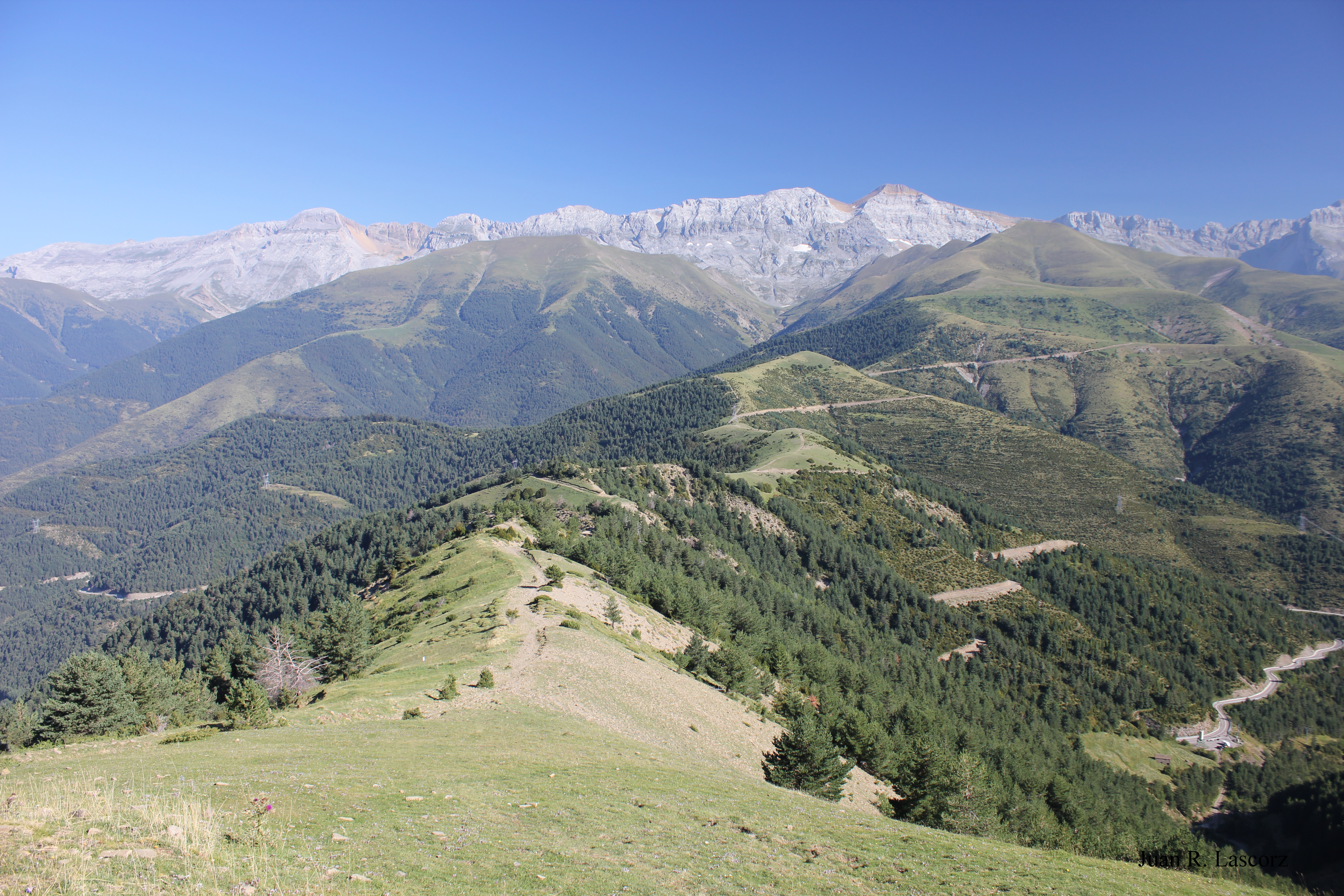 Aragonés: O puerto de Cotefablo y o cerro Leturiacha dende o cuello d'Otal. A costau y costau sei puede veyer a carretera N-260 como dentra y sale d'o tunel de Cotefablo.